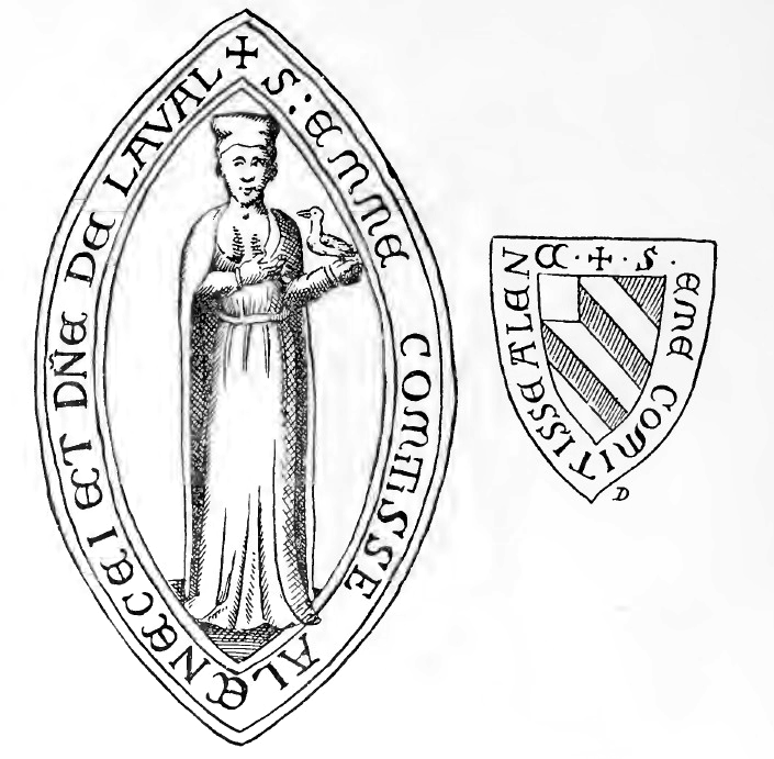 Sello y Contrasello de Emma de Laval